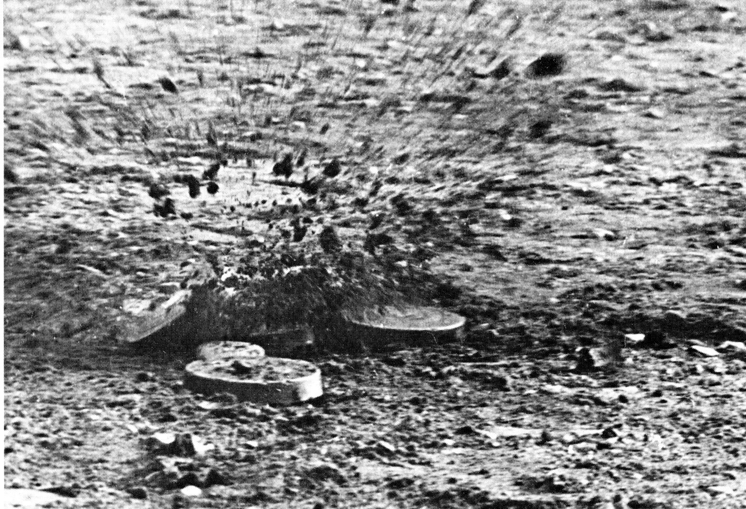 Un momento di azione del palet valdostano. Un palet colpisce il bolìn.